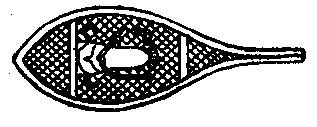 Historischer kanadischer Schneeschuh